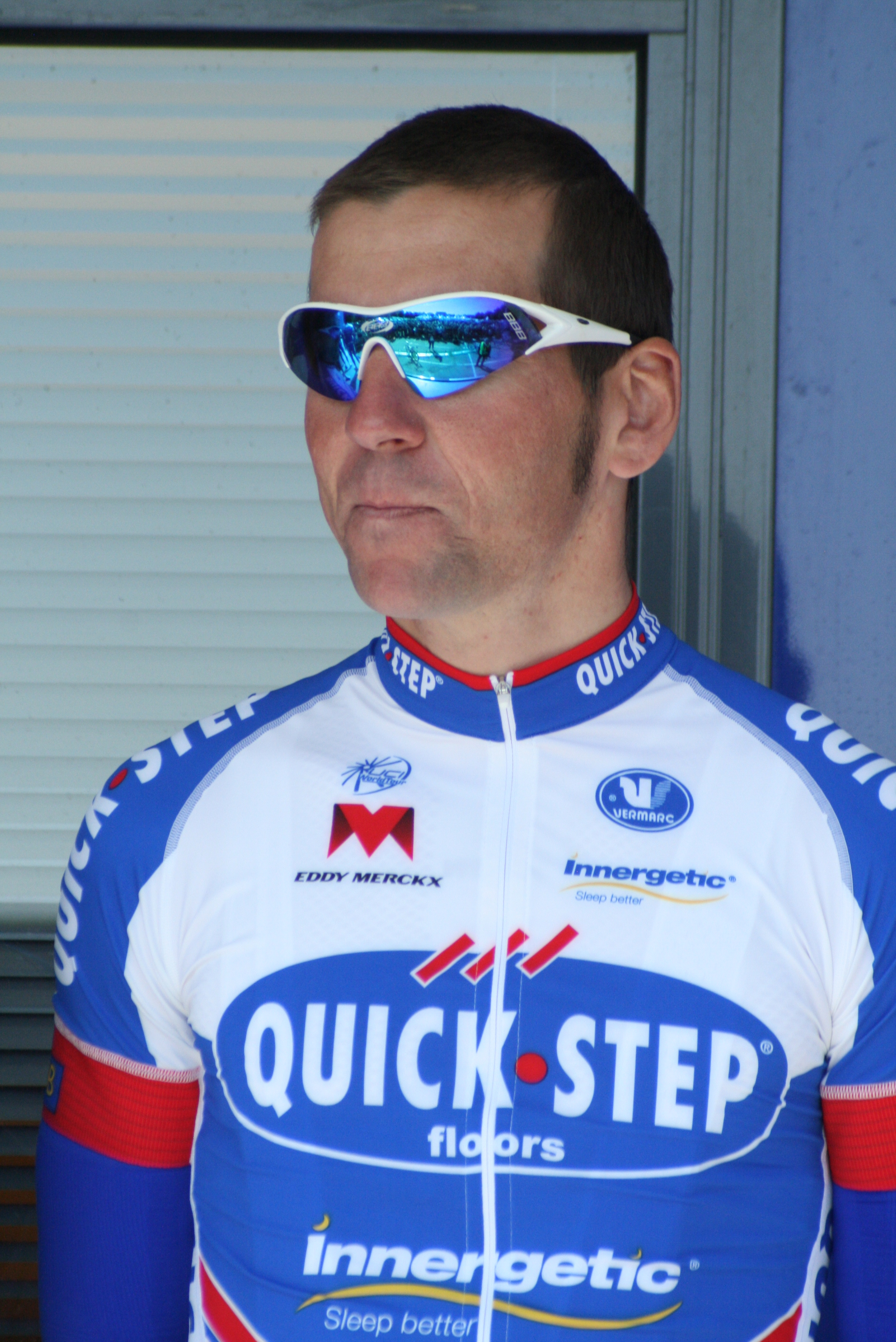 Présentation des coureurs au départ de la première étape Andy Cappelle